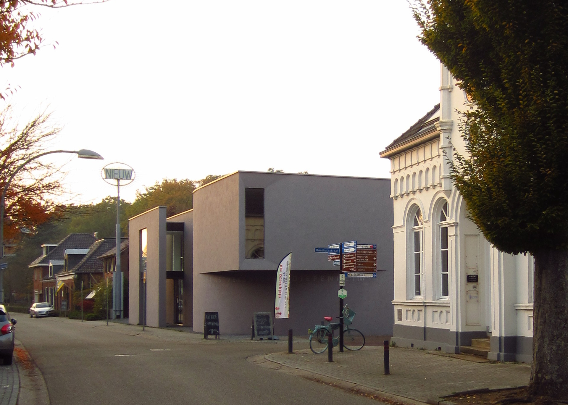 Kunstvereniging Diepenheim hoofdgebouw, met lichtkunstwerk NIEUW van John Körmeling. Het witte gebouw rechts is het oude gemeentehuis van Diepenheim, waar Galerij 1881 – de voorganger van de Kunstvereniging – was gevestigd.